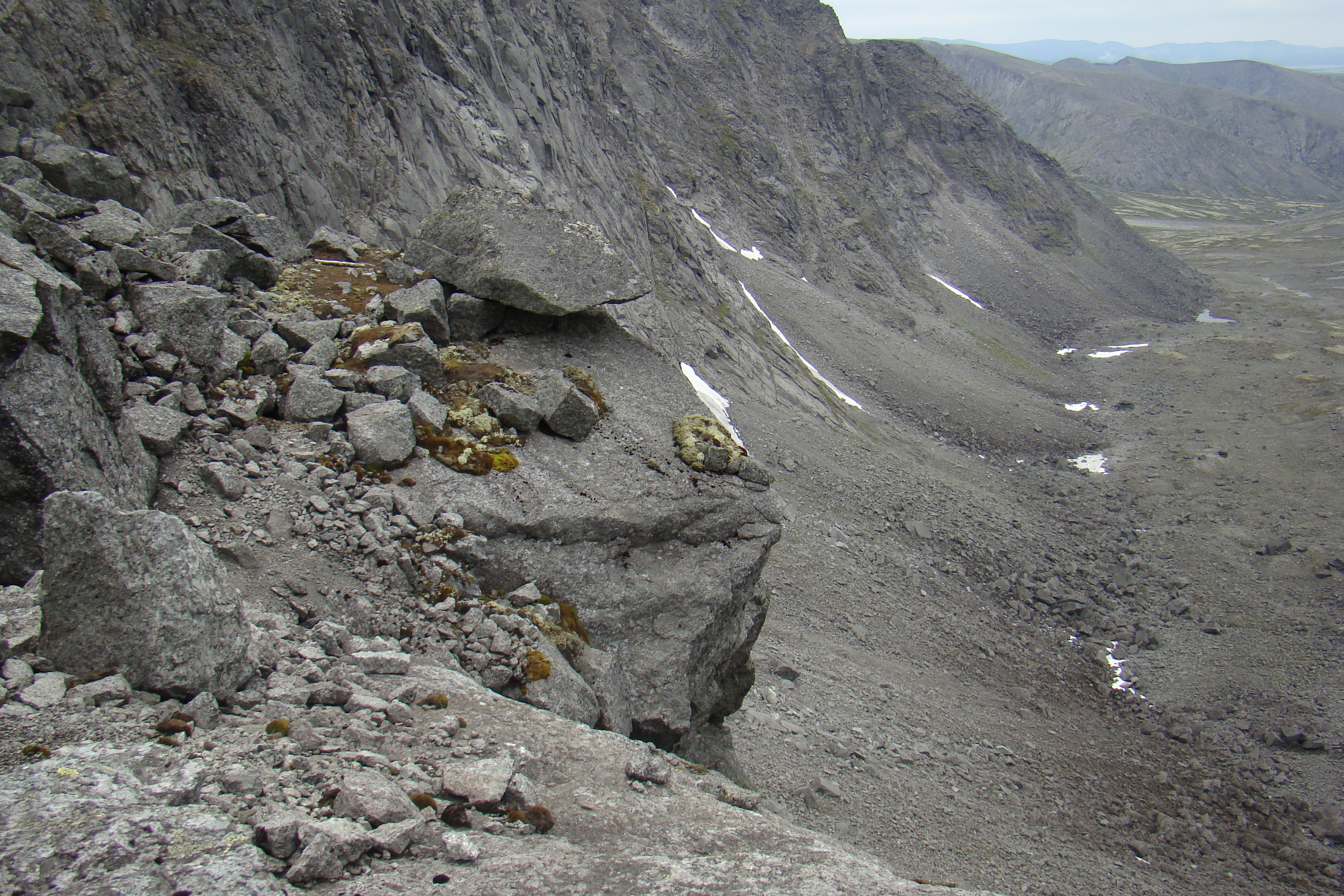 Перевал Ферсмана, Мурманская обл.